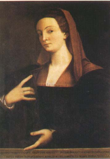 Giulia Gonzaga, Il Castello di Fondi (Museo e Centro Culturale)